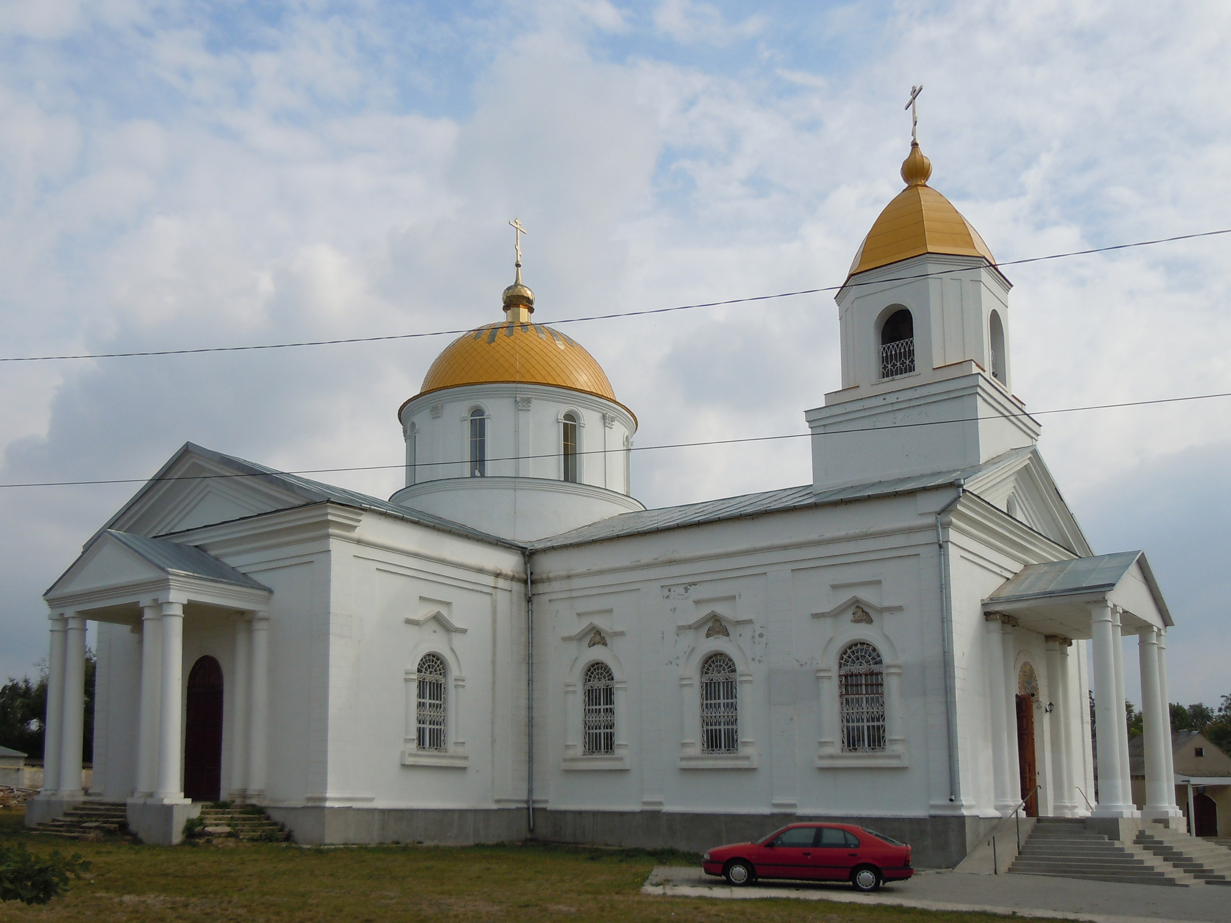 Миколаївська церква (Михайлівська), Болград, пр-т Леніна, ріг вул. А. Христєва і Варненської